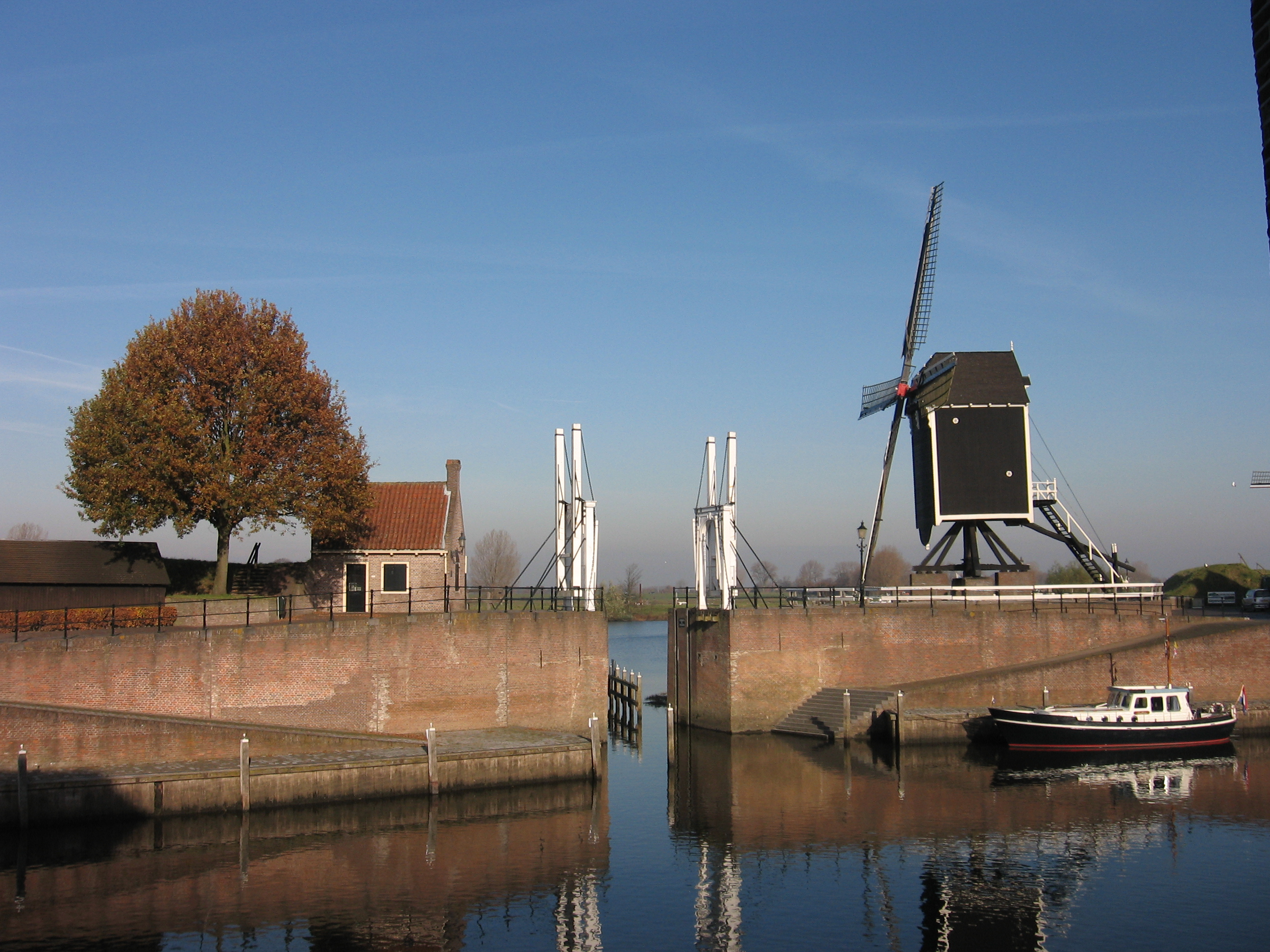 Heusden, molen nr I